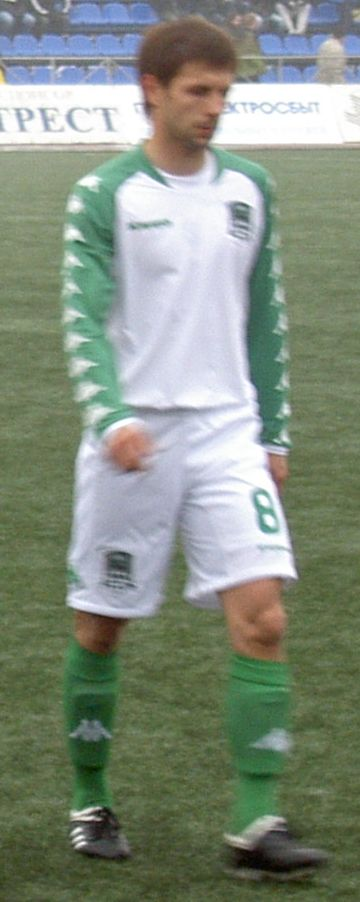 Олейник Александр Александрович